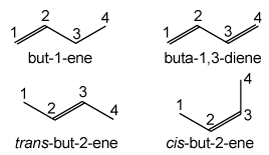 IUPAC naming (alkene)